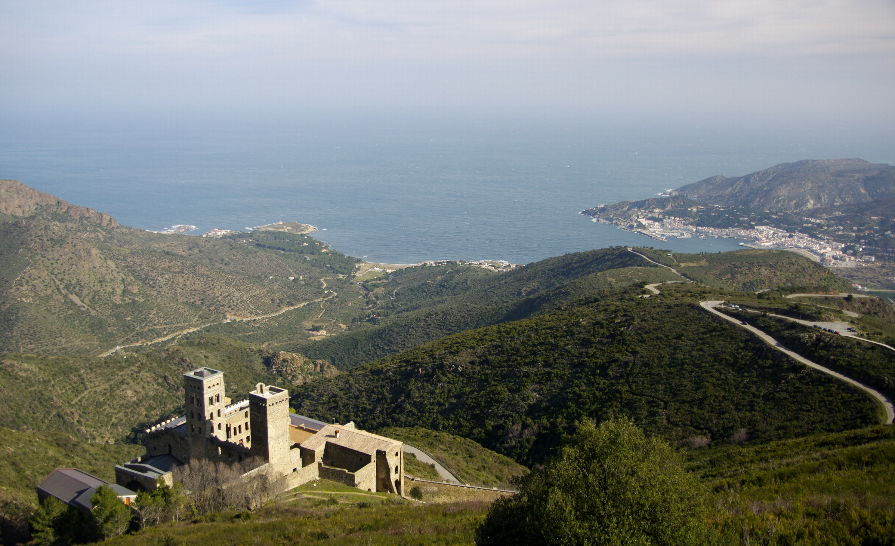 Monestir de Sant Pere de Rodes (El Port de la Selva)